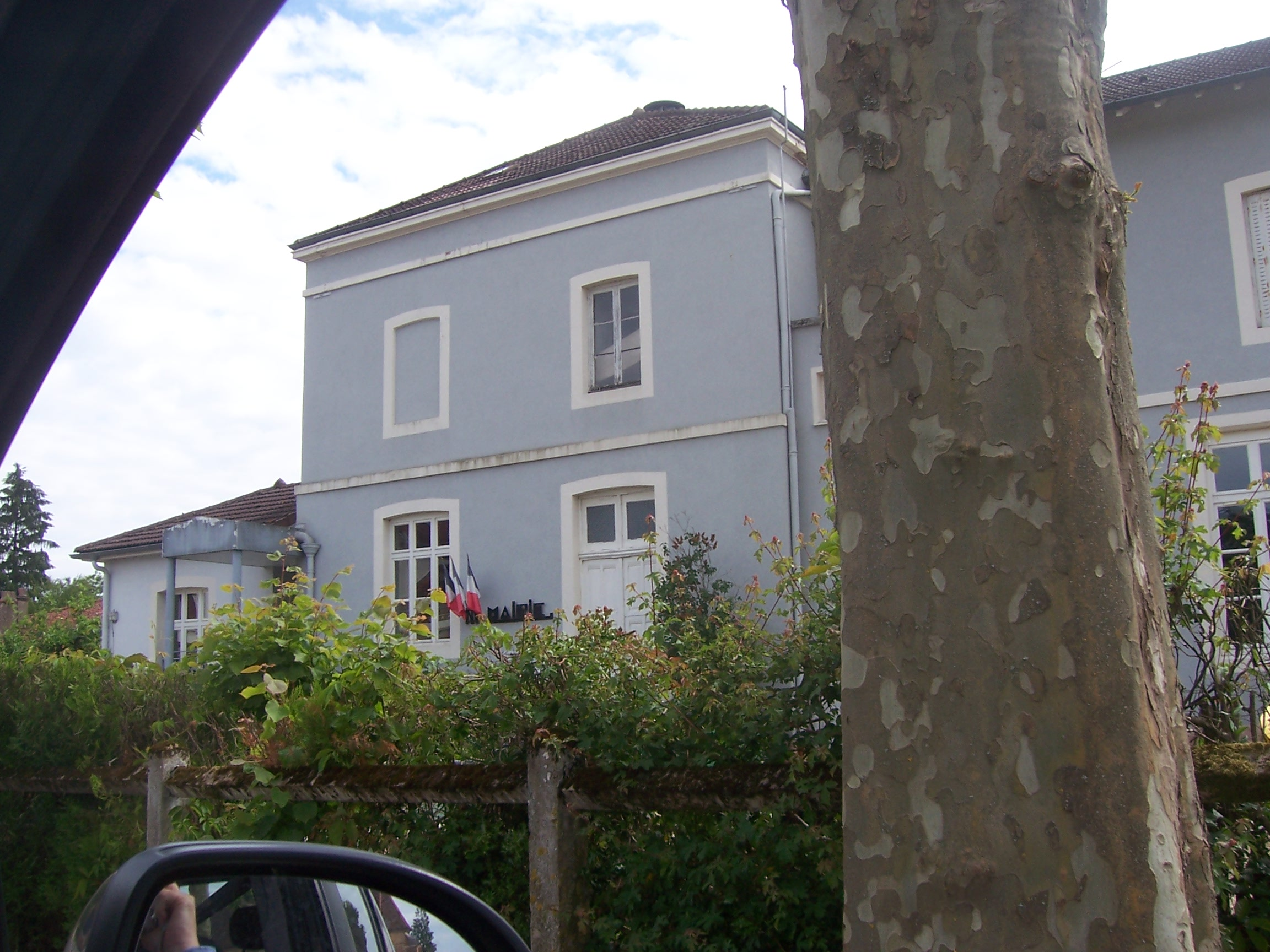 Mairie de Cuisery